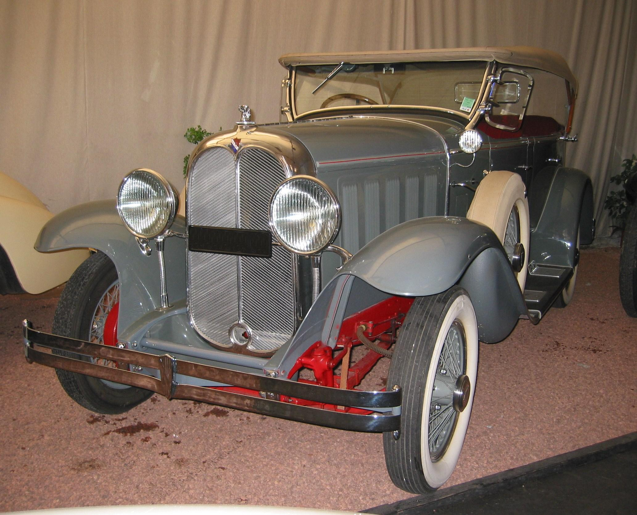 Oakland 1929